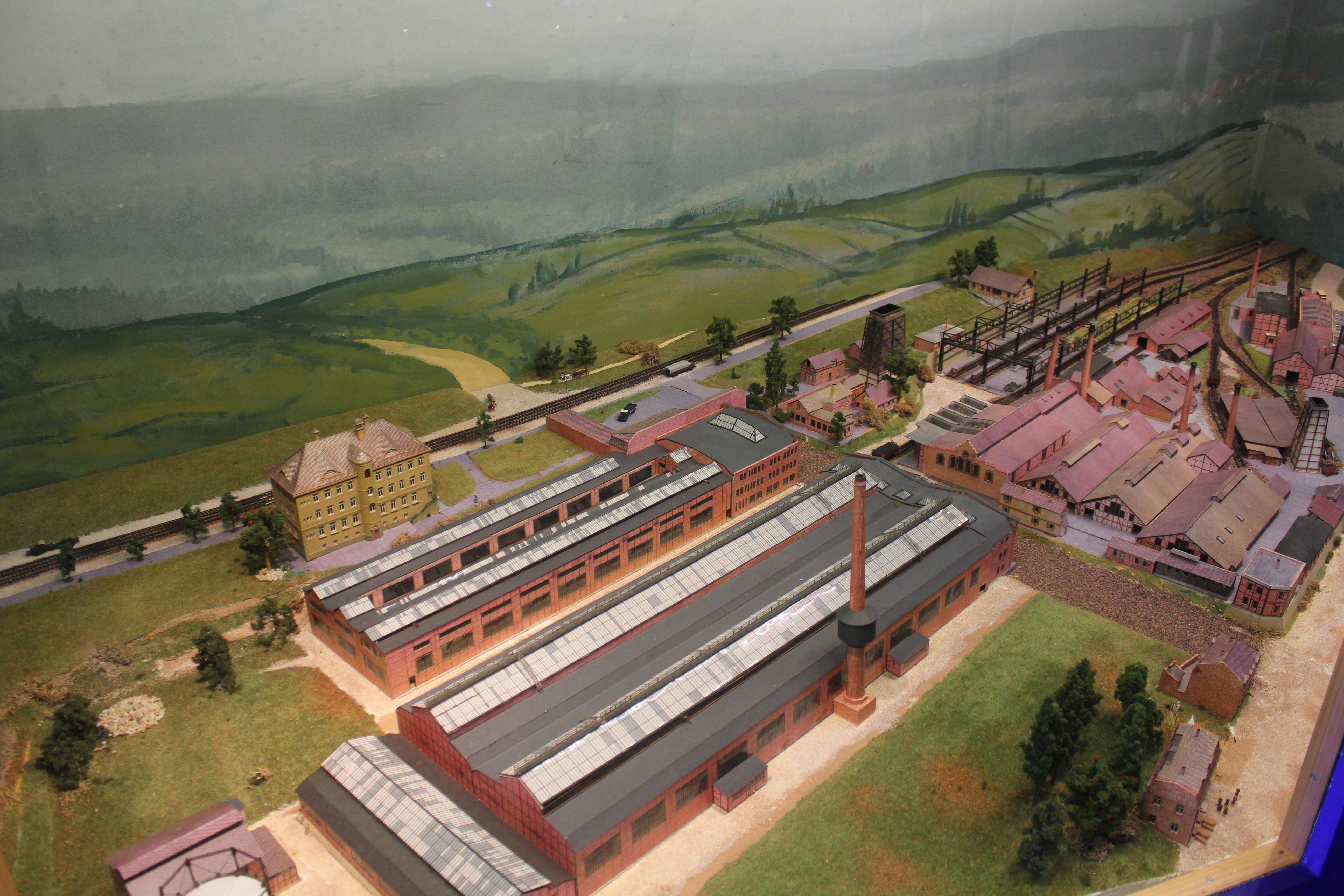 Modell des ehemaligen Nürnberger Tafelwerks